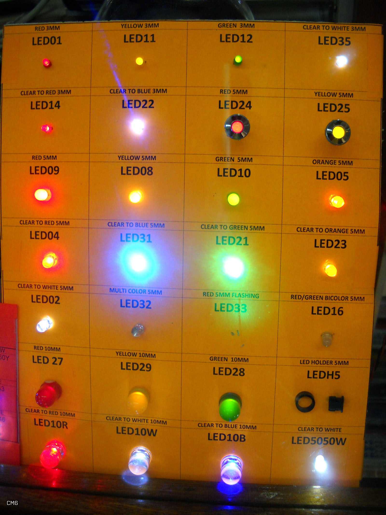 LED display